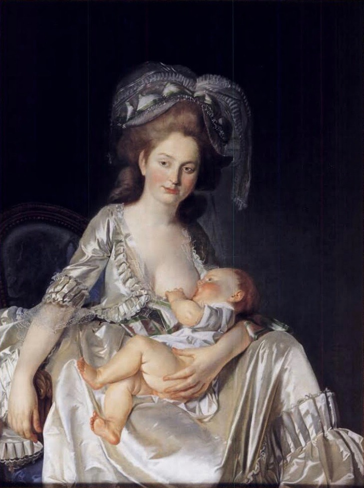 Louis-Roland Trinquesse (um 1745–1799): Stillende junge Frau. Öl auf Leinwand, 115 x 88 cm. Privatsammlung.